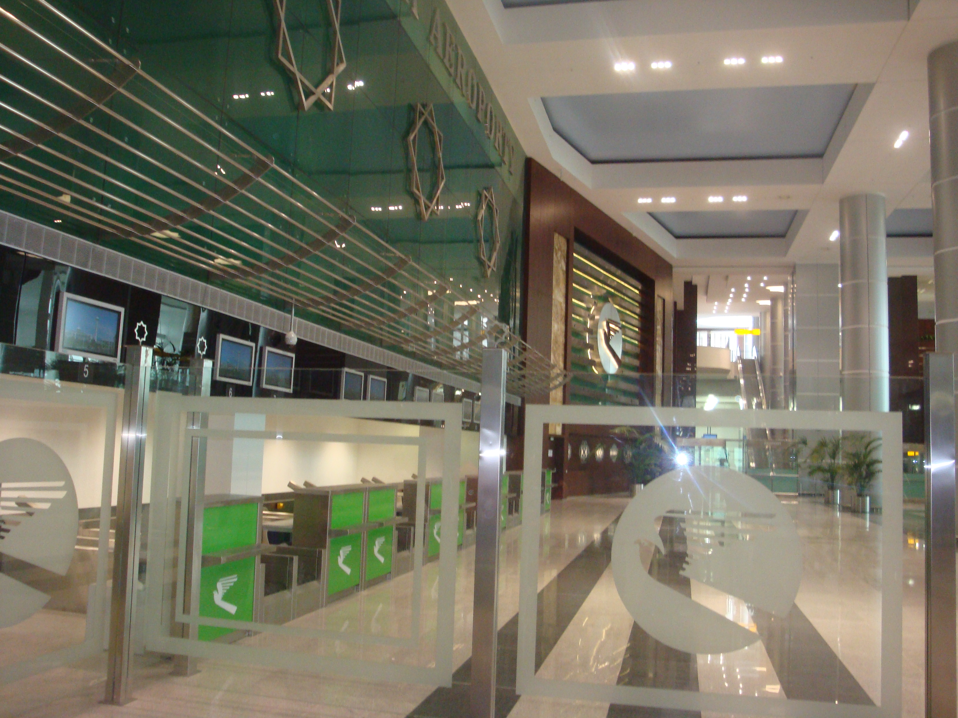 Стойки регистрации в аэропорту города Туркменбаши